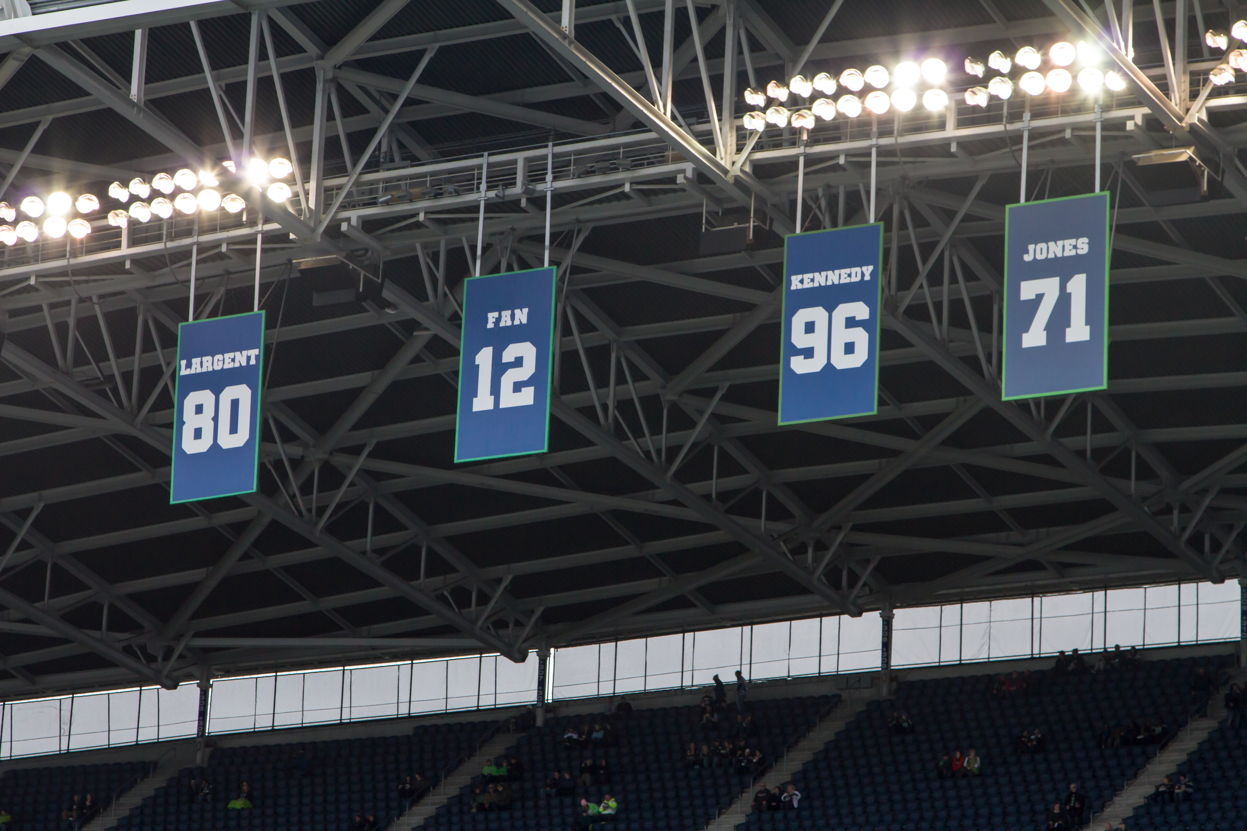 Seattle Seahawks Retired Numbers at Century Link Field